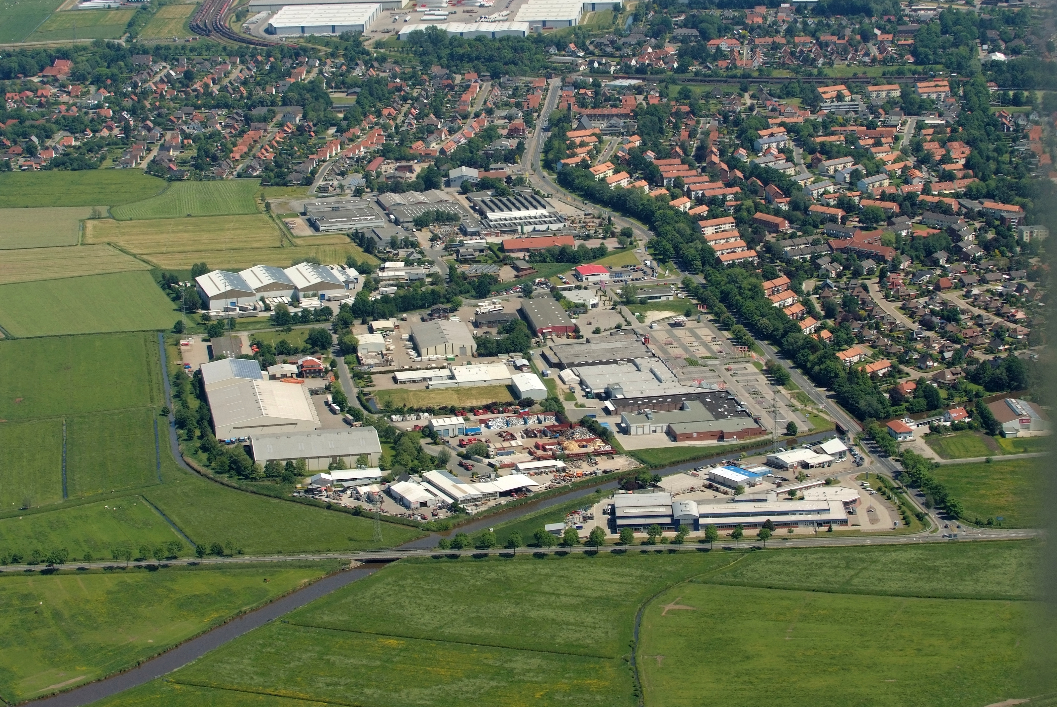 Nord-Brake (Unterweser), Gewerbegebiet im Nordwesten Fotoflug vom Flugplatz Nordholz-Spieka über Cuxhaven und Wilhelmshaven